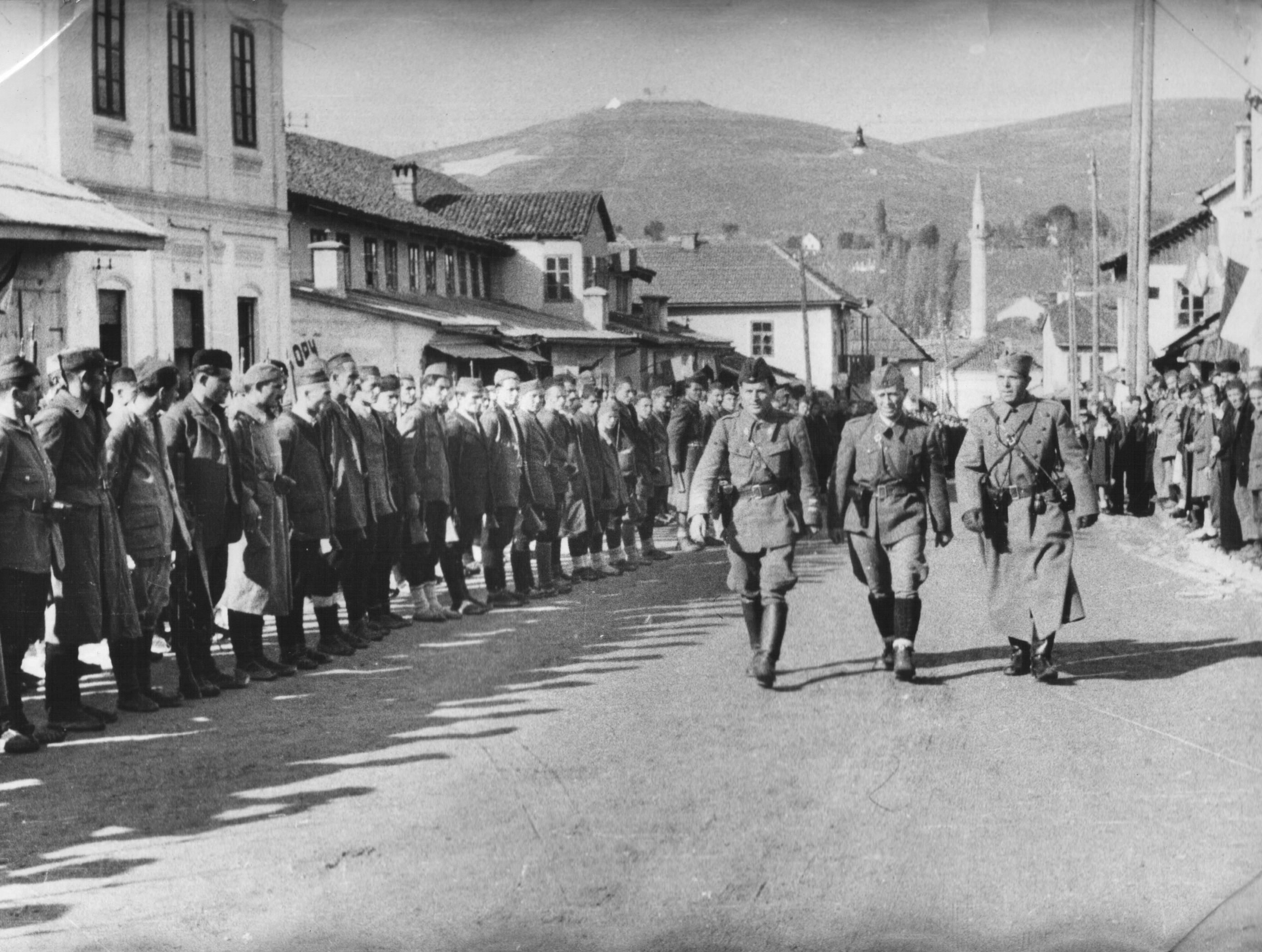 Srpskohrvatski / српскохрватски: Peko Dapčević, komandant II udarnog korpusa, komesar korpusa Mitar Bakić i pomoćnik načelnika štaba Branko Obradović obilaze postrojene jedinice u Pljevljima, na godišnjicu oktobarske revolucije 1943.